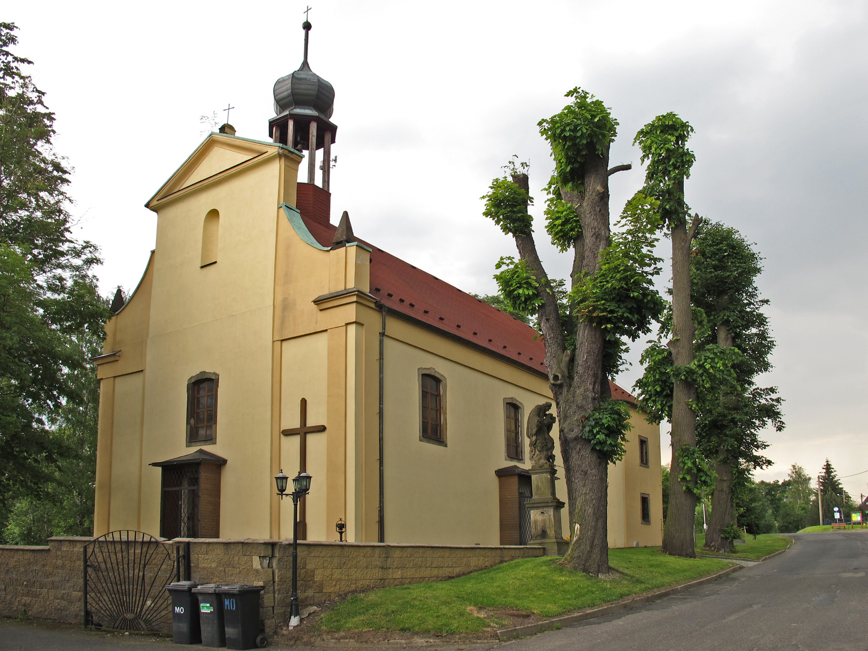 Restaurovaný barokní jednolodní kostel Michaela Archanděla z let 1720-1730